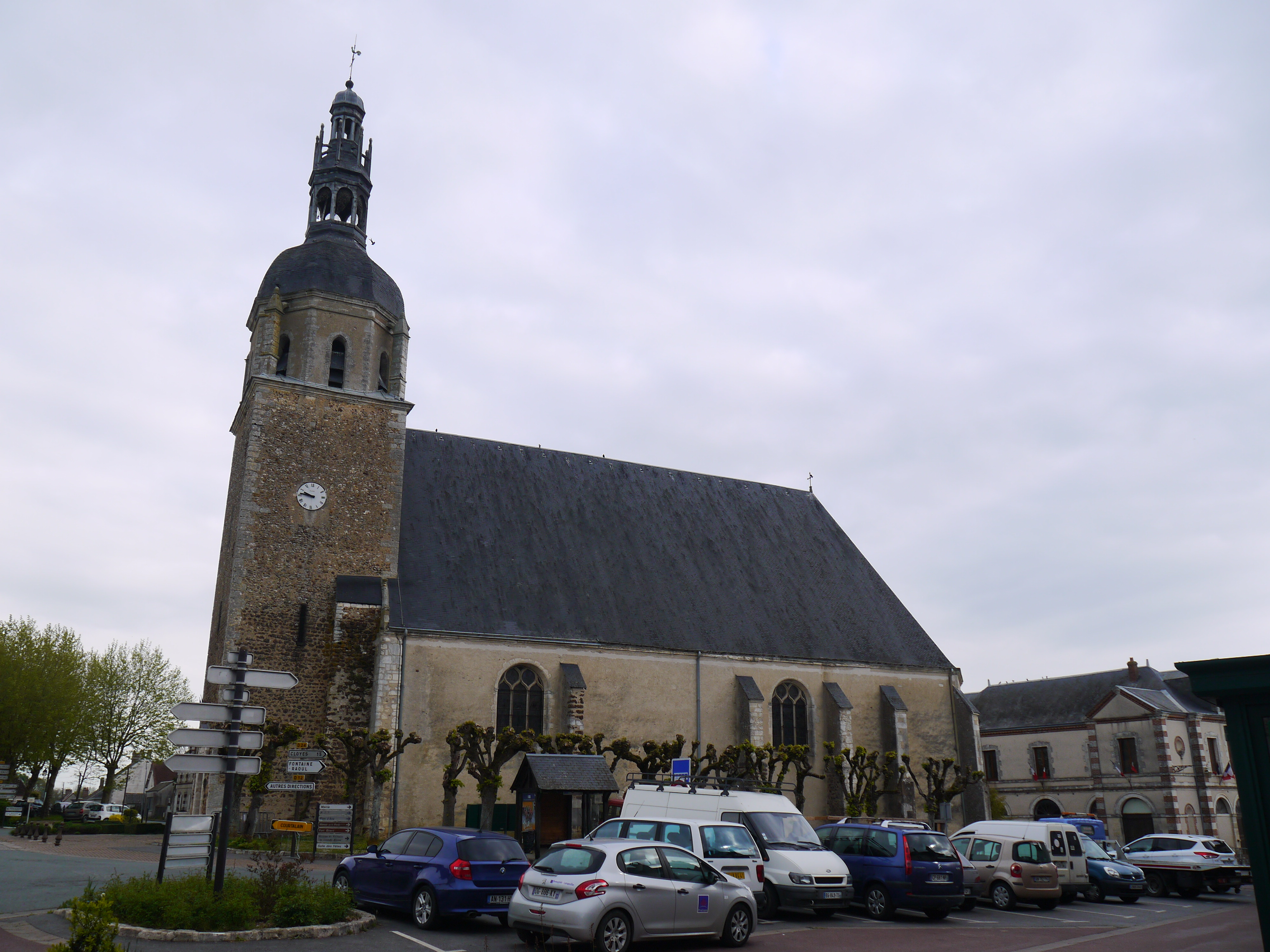 L'église Saint-Barthélemy.